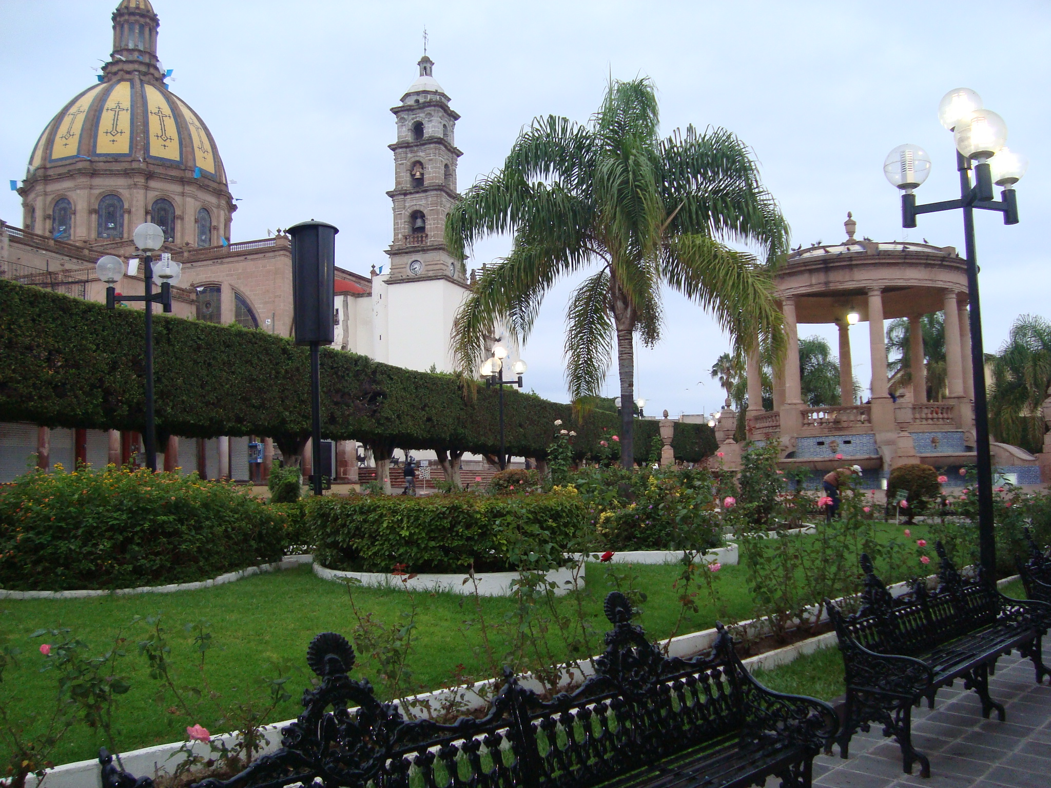 Centro histórico. La Piedad Michoacán, México.